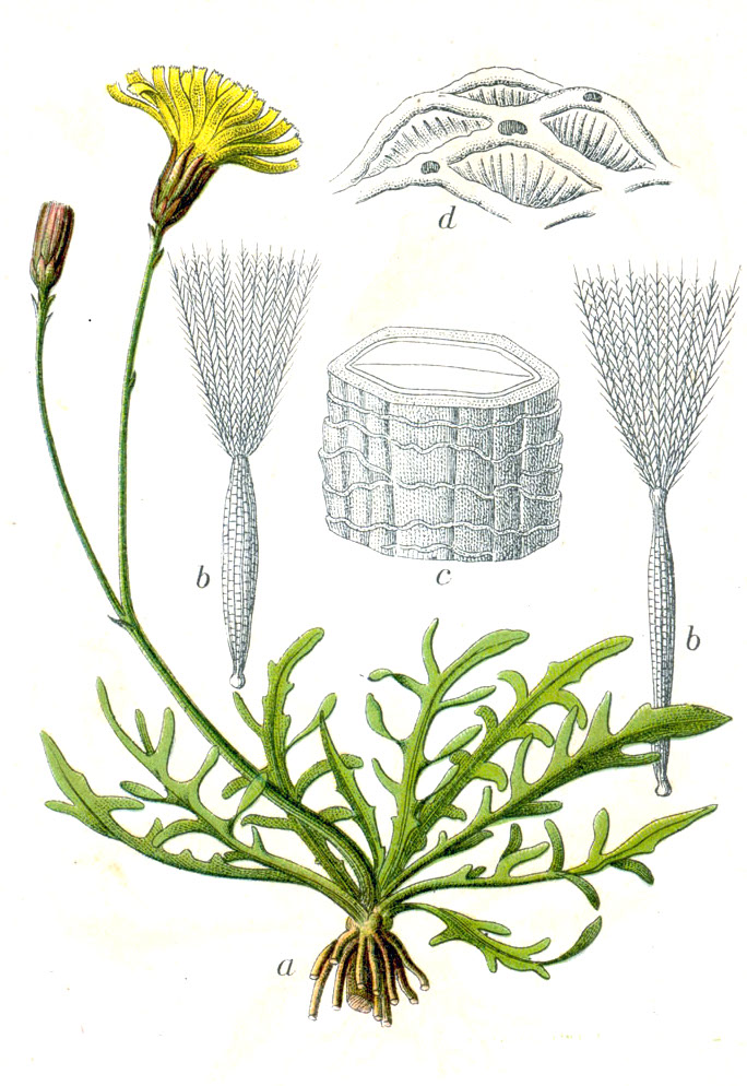 Leontodon autumnalis L. Original Caption Gemeiner Hasenlattich, Leontodon autumnalis